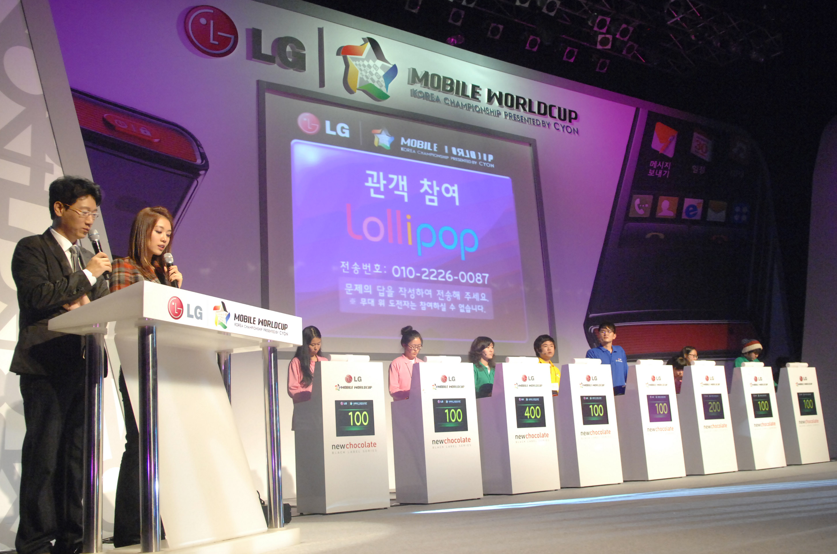 MC: 지석진, 서현진